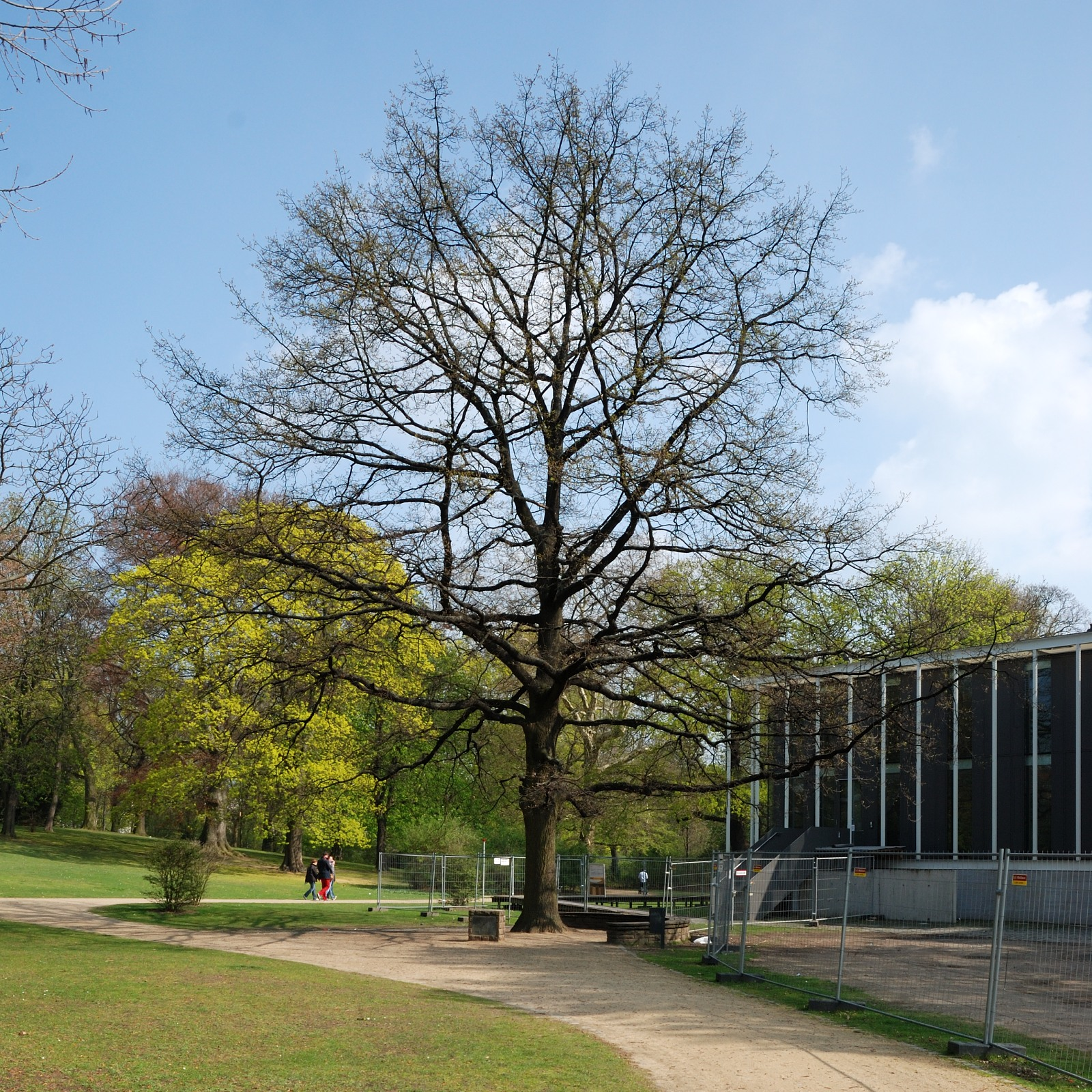 Schillereiche in Braunschweig am Herzog-Anton-Ulrich-Museum, im Frühjahr 2014, noch ohne Laub